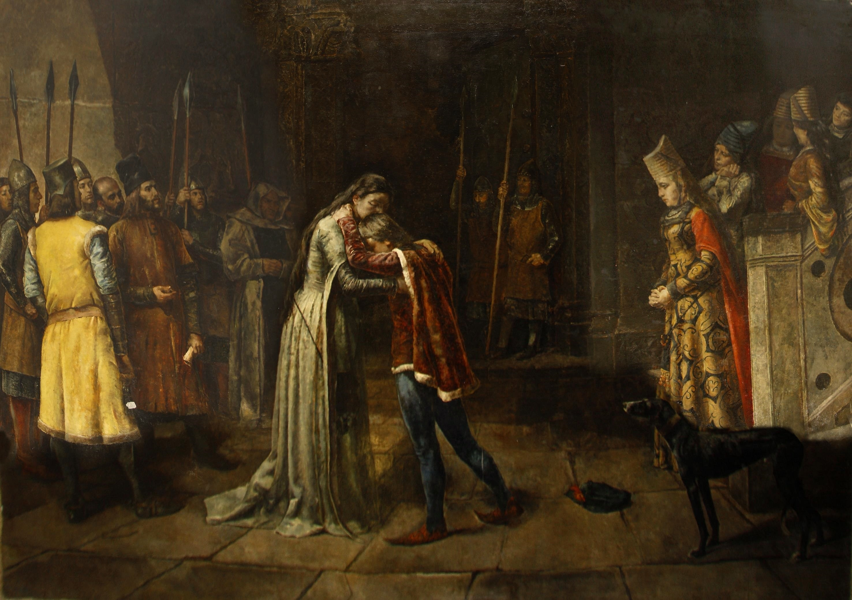 La obra representa el momento en que Leonor de Guzmán († 1351), amante y favorita de Alfonso XI de Castilla y apresada poco después de la muerte de dicho monarca por su hijo y sucesor, Pedro I de Castilla, se despidió de su hijo Fadrique Alfonso de Castilla, que ya era maestre de la Orden de Santiago, en presencia de la reina María de Portugal, viuda de Alfonso XI y madre del nuevo monarca castellano. Y fue la reina María de Portugal quien ordenó en 1351 que ejecutaran a Leonor de Guzmán en Talavera de la Reina.